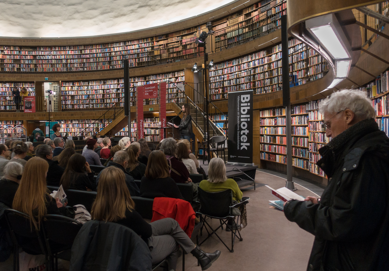 Poesimässan på Stockholms Stadsbibliotek den 23 mars 2018.